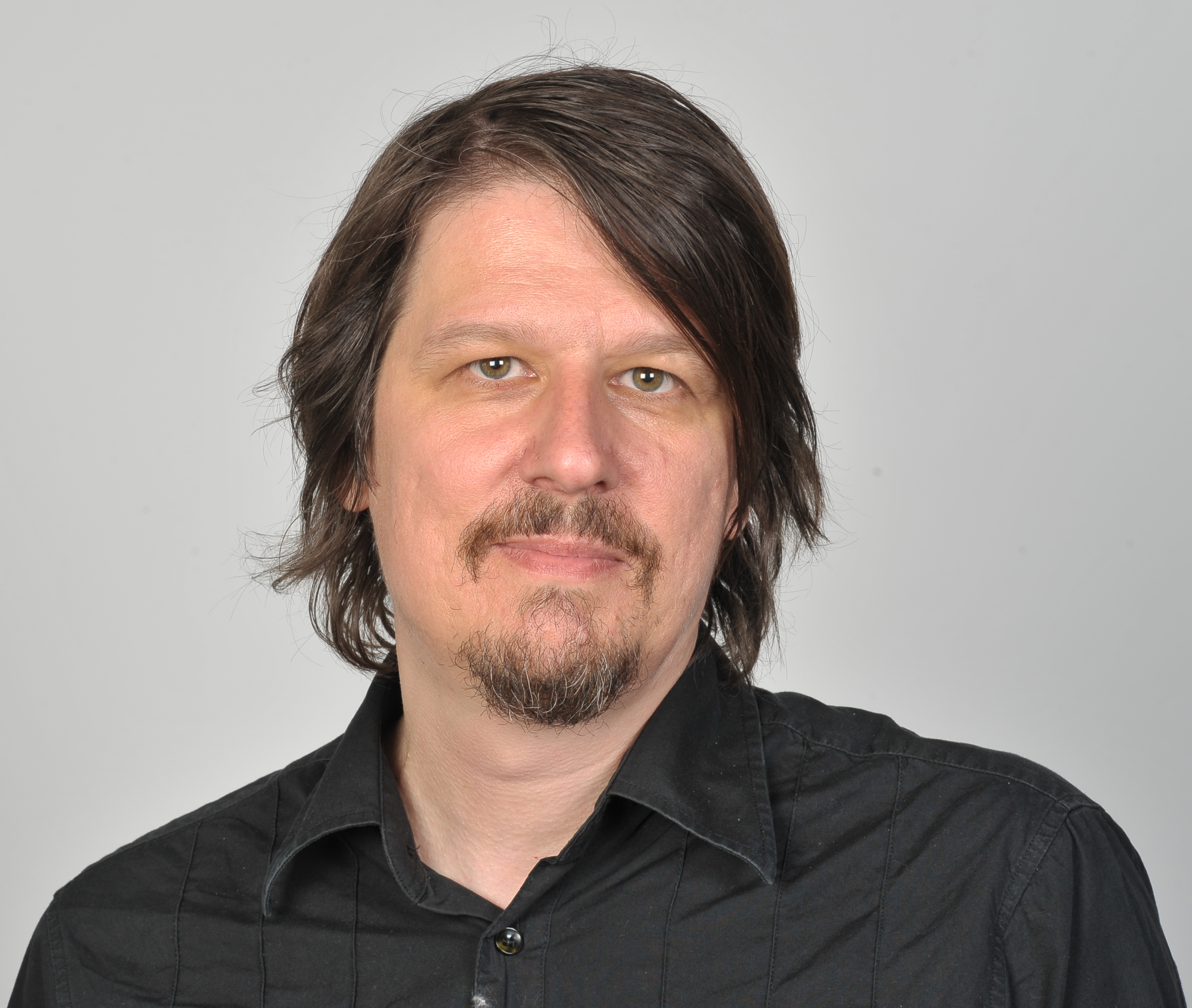 Der österreichische Szenenbildner Hannes Salat (Künstlerhaus, Wien, Österreich)